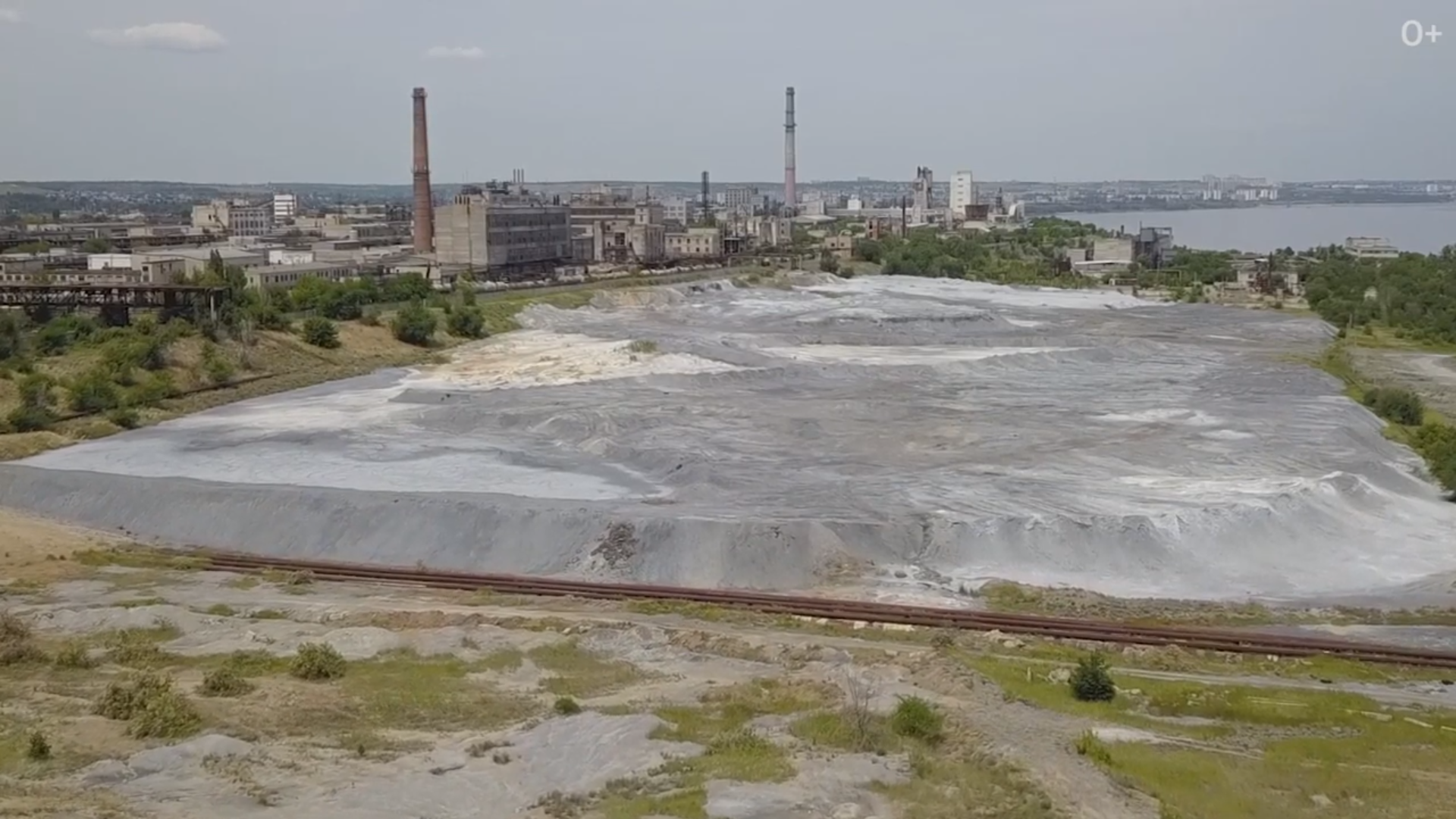 Шламонакопитель «Белое море» — полигон химических отходов у бывшего завода Химпром, Волгоград